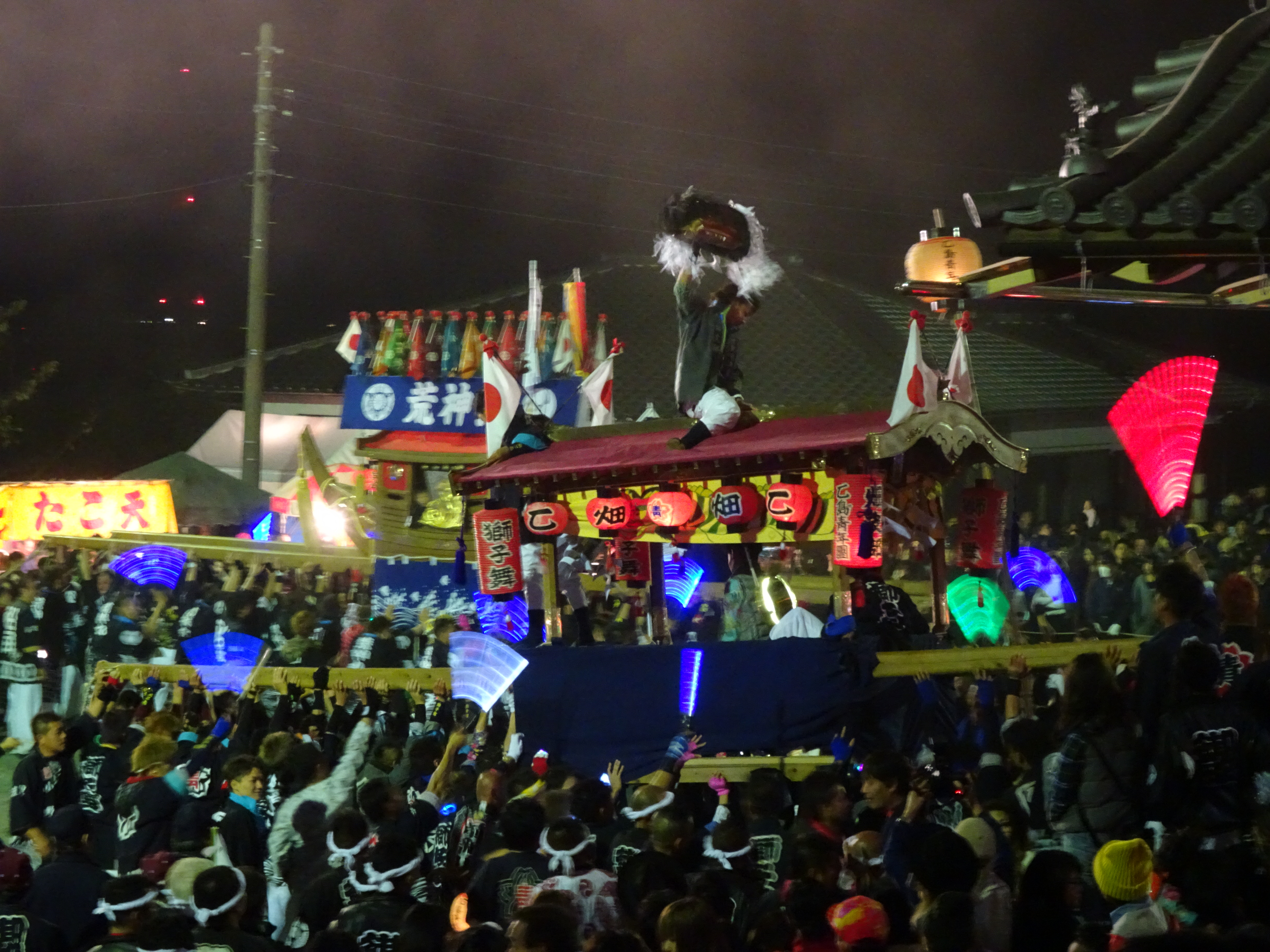 乙島祭り 2015 1 (倉敷市玉島)